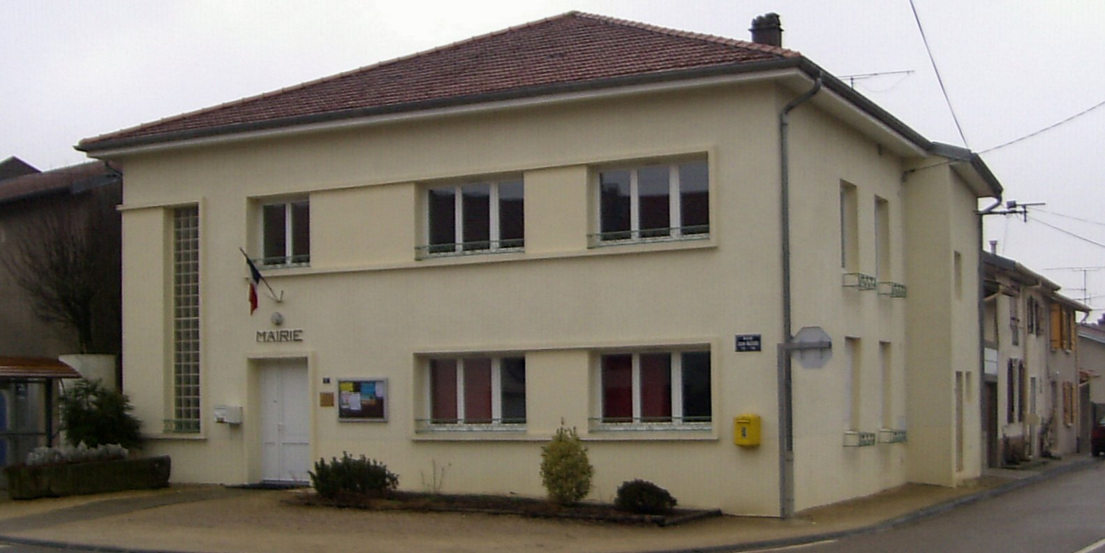 La mairie d'Omelmont